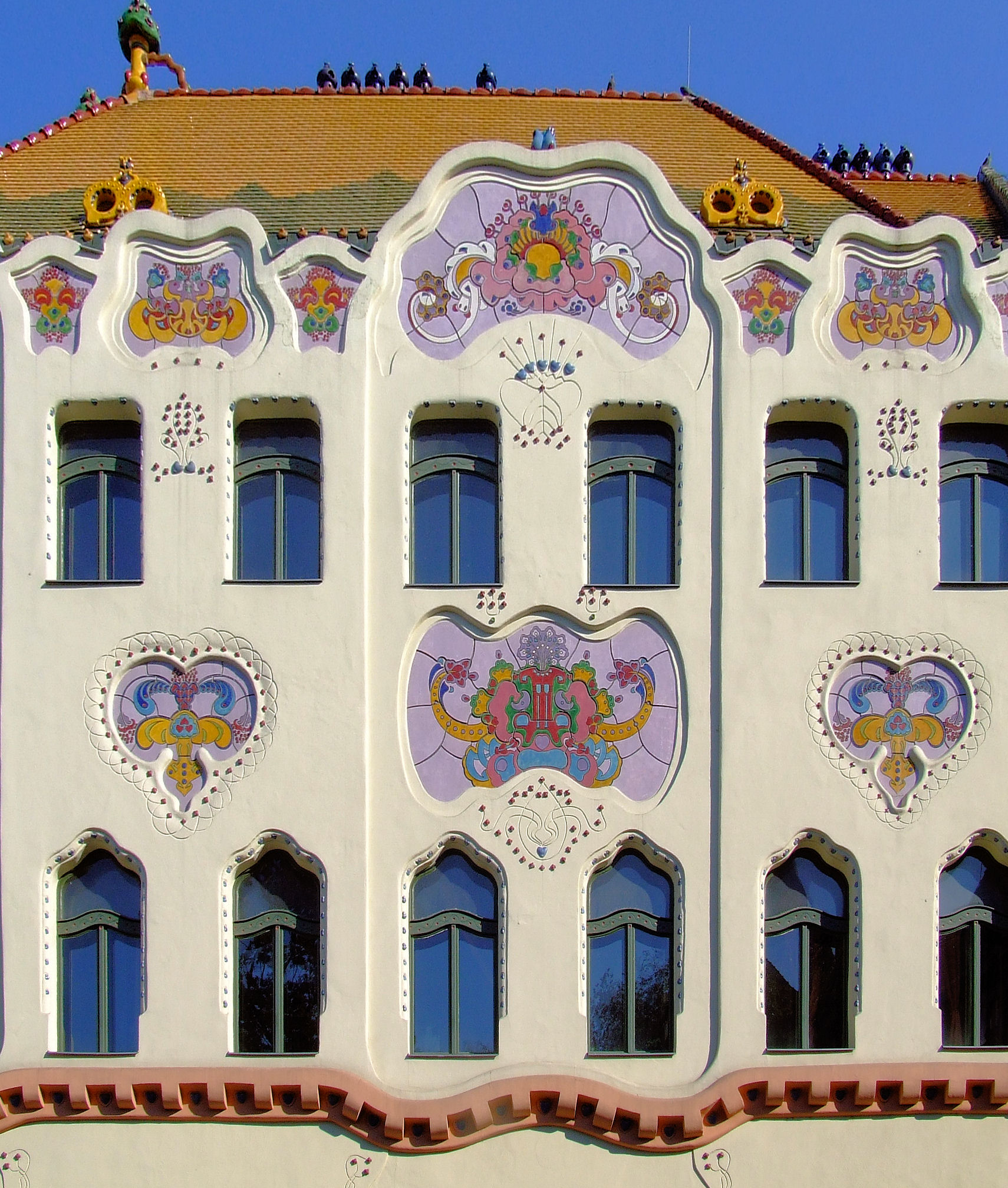 A pécsi Zsolnay gyárban készített majolika díszítés a kecskeméti Cifra palotán